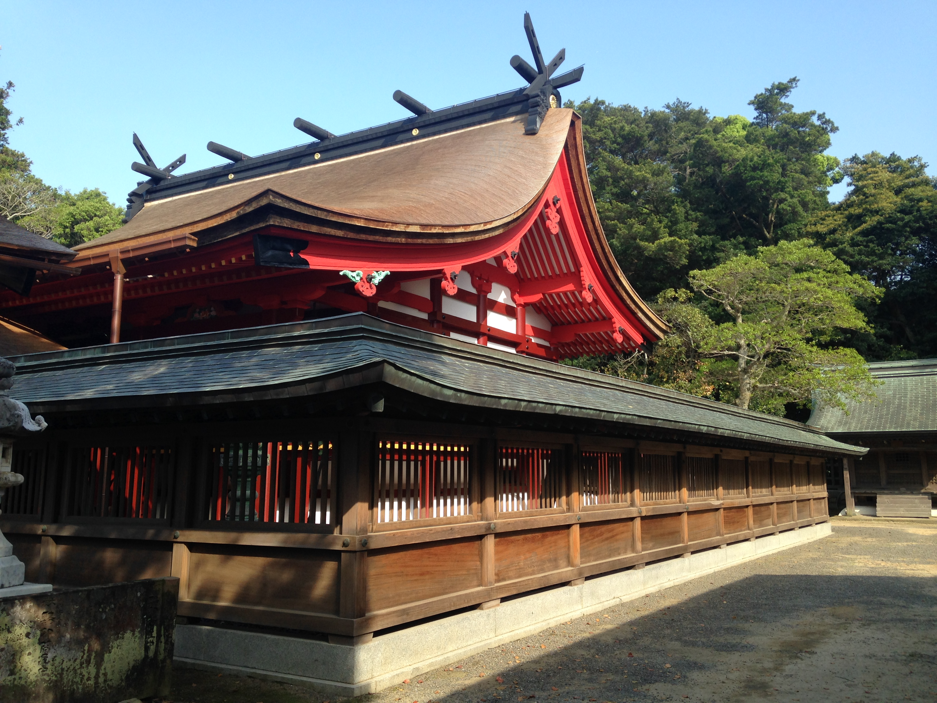 宗像大社(辺津宮)の本殿